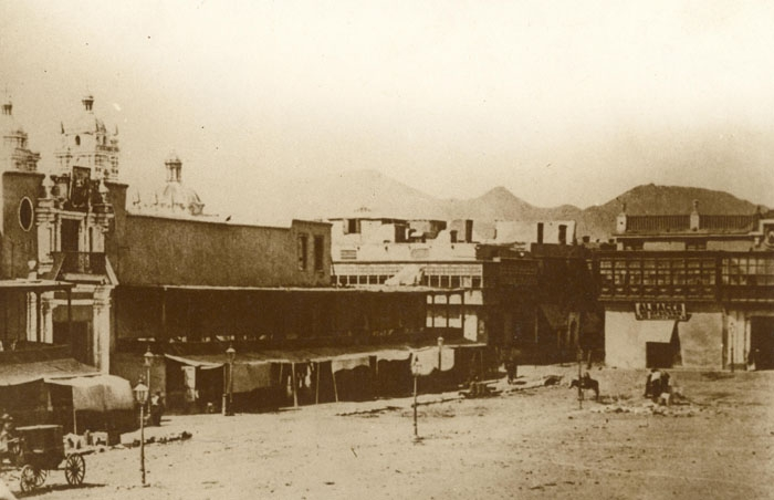 Palacio de Gobierno del Perú, en Lima, Fotografía de Eugenio Courret tomada en el año 1860